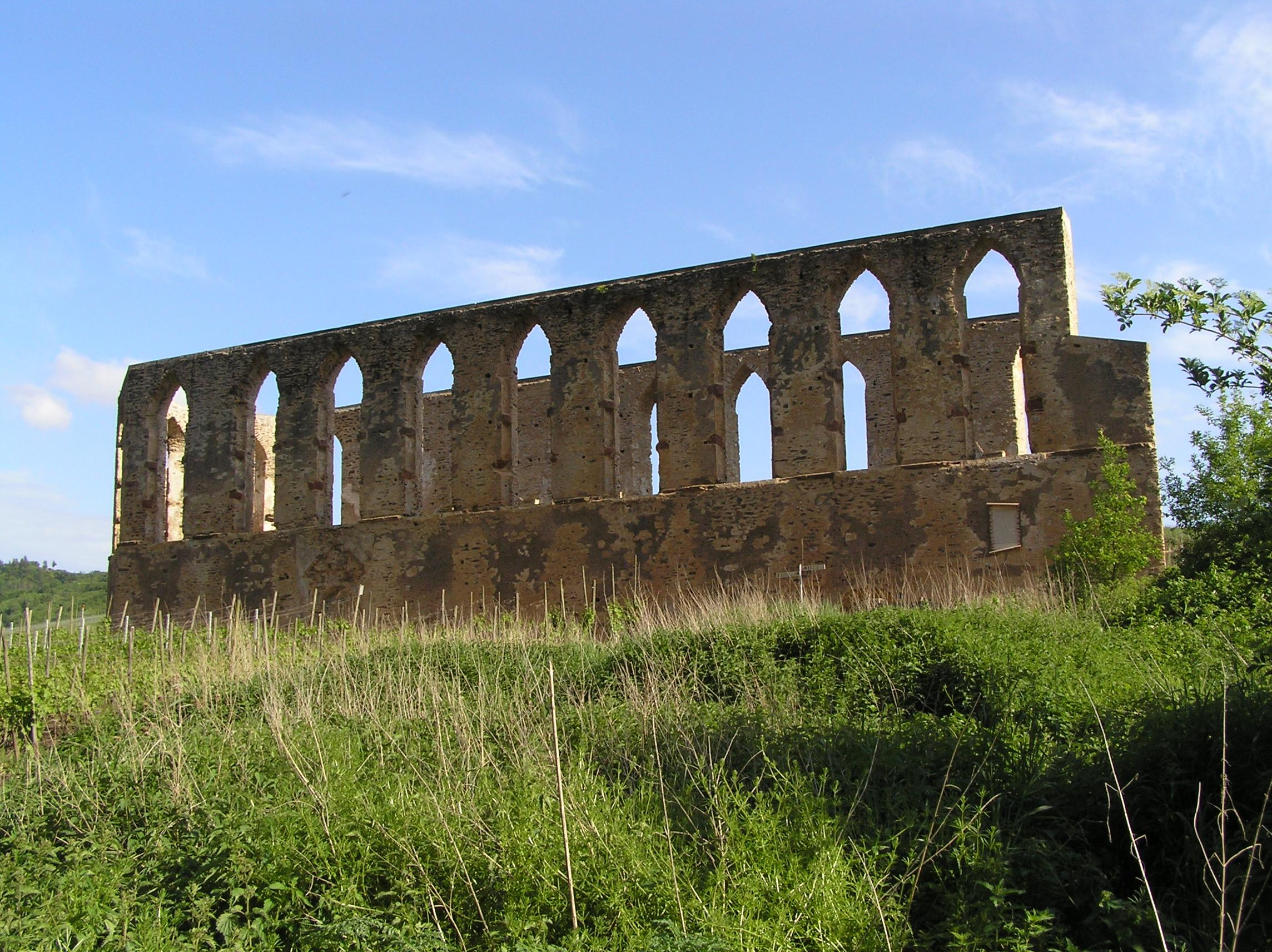 ehemaliges Kloster Stuben Seitenansicht des Hauptschiffes